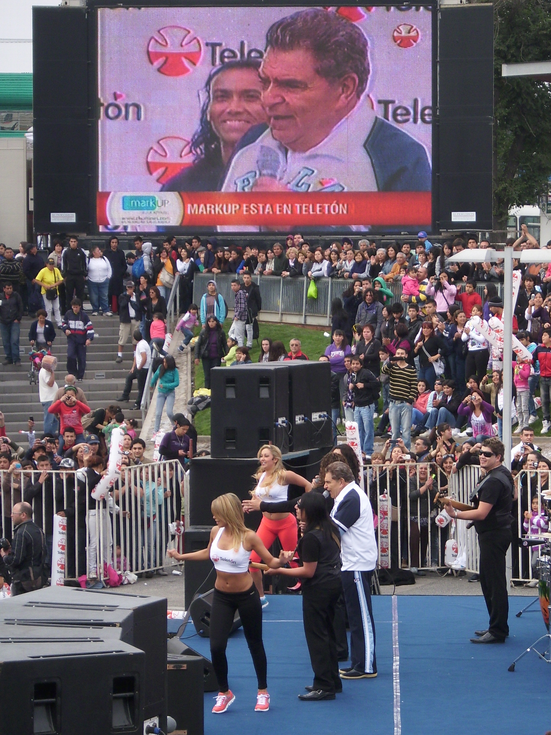 Don Francisco animando el show de la Teletón en la Plaza de Armas de Maipú el sábado 3 de diciembre de 2011.